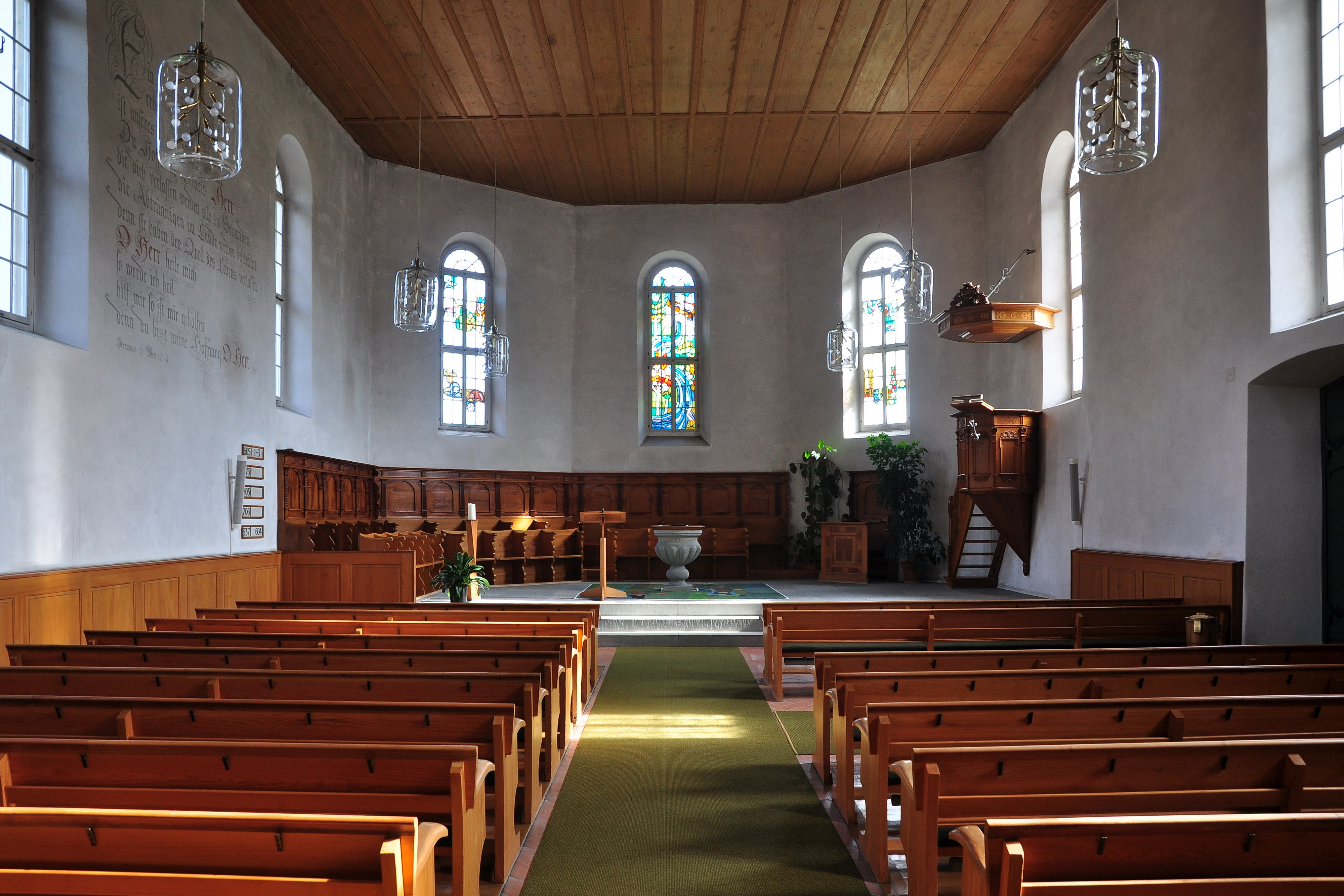 Kirchenbezirk, Büelstrasse 15 in Weiach (Switzerland)